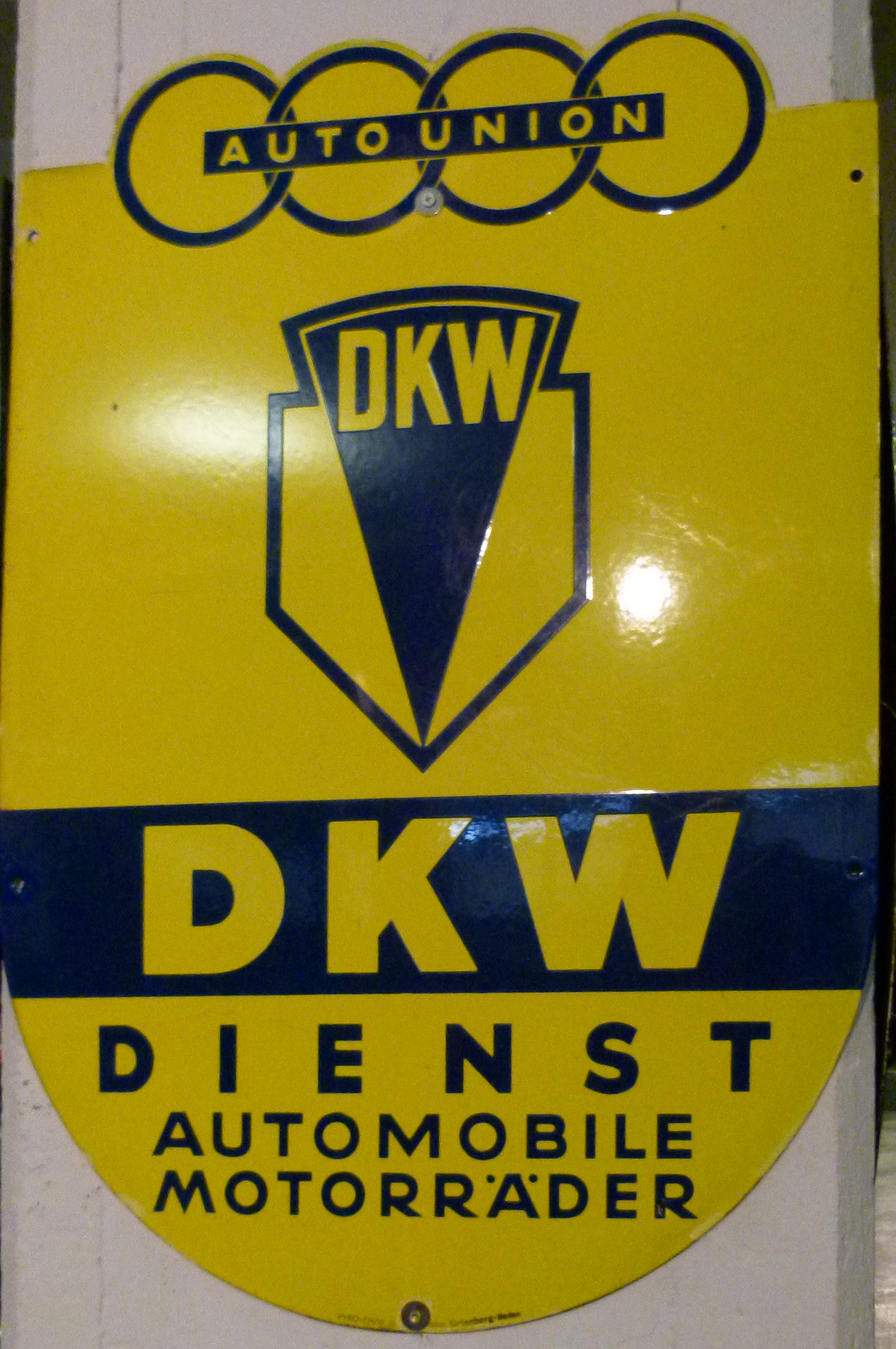 Originales Schild der Auto-Union: DKW Dienst